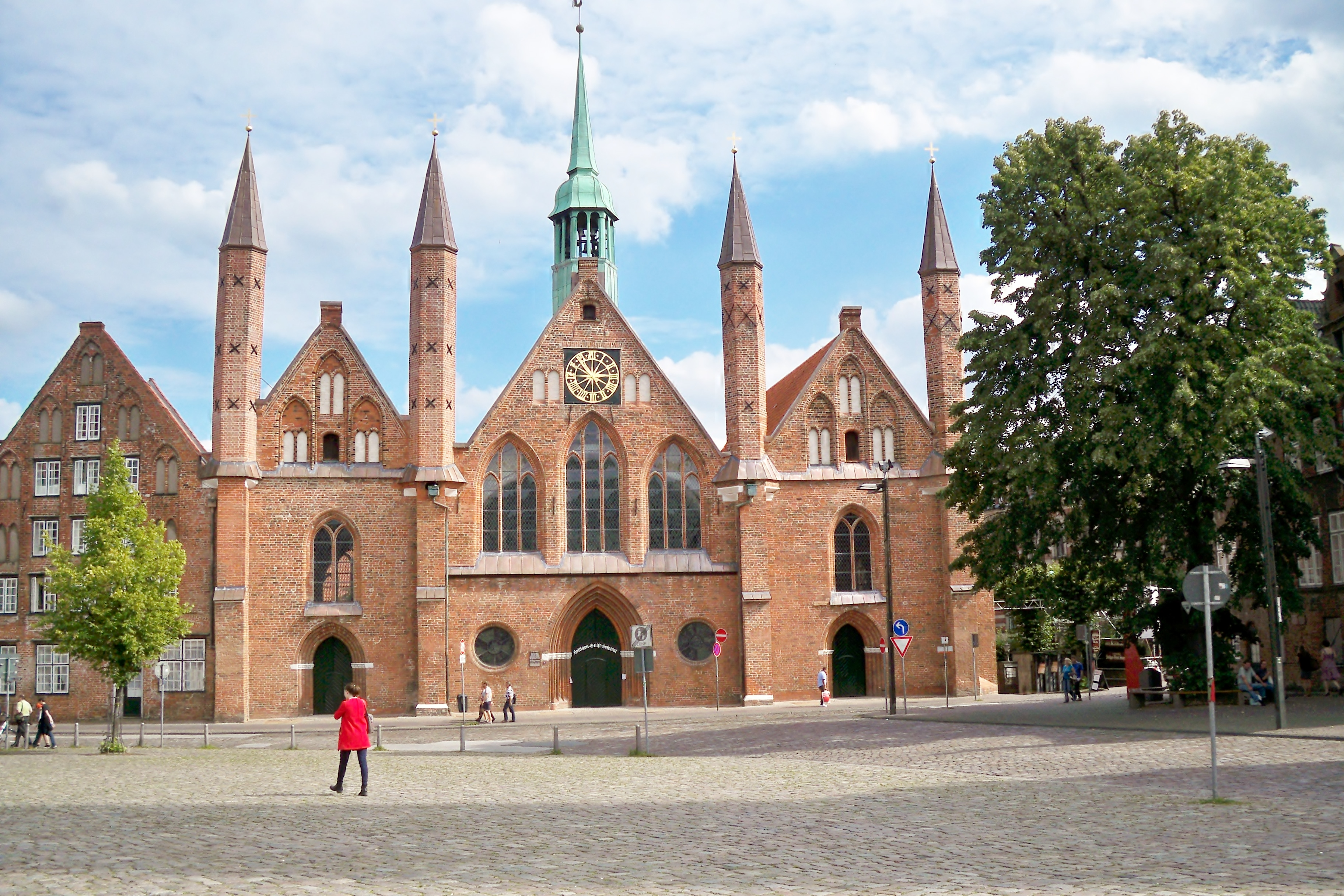 Heiligen-Geist-Hospital in Lübek im August 2015